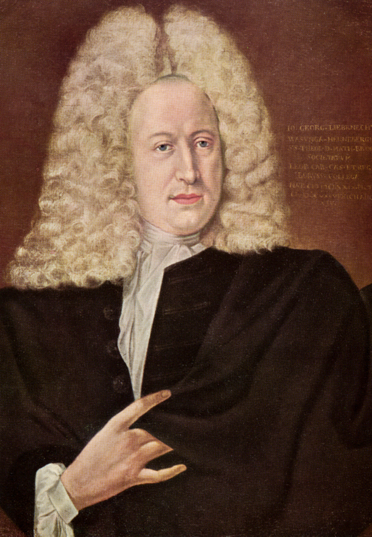 Johann Georg Liebknecht (1679-1749) als Rektor der Universität Gießen